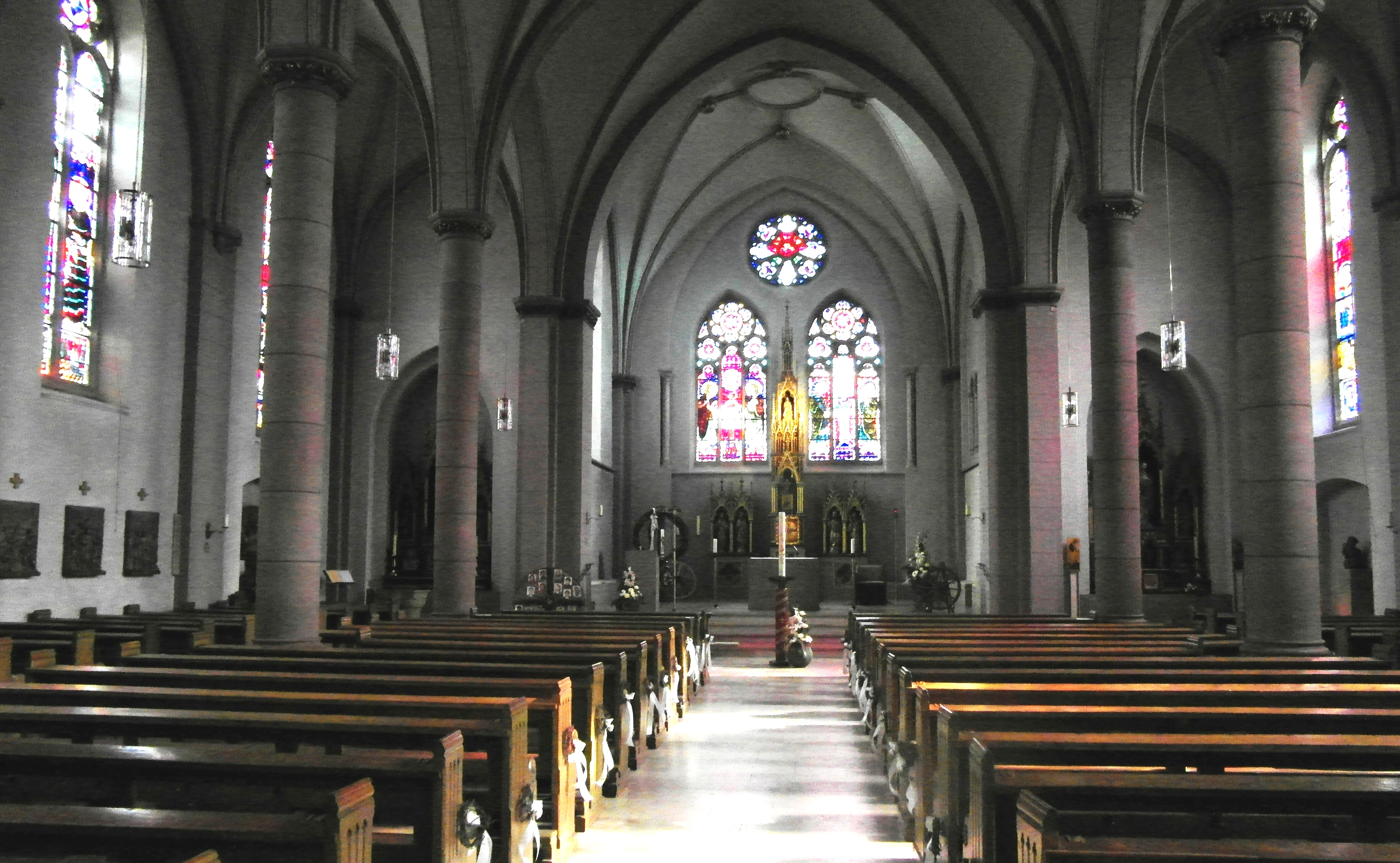 Baudenkmal St. Nikolaus Grevenbrück - Innenansicht